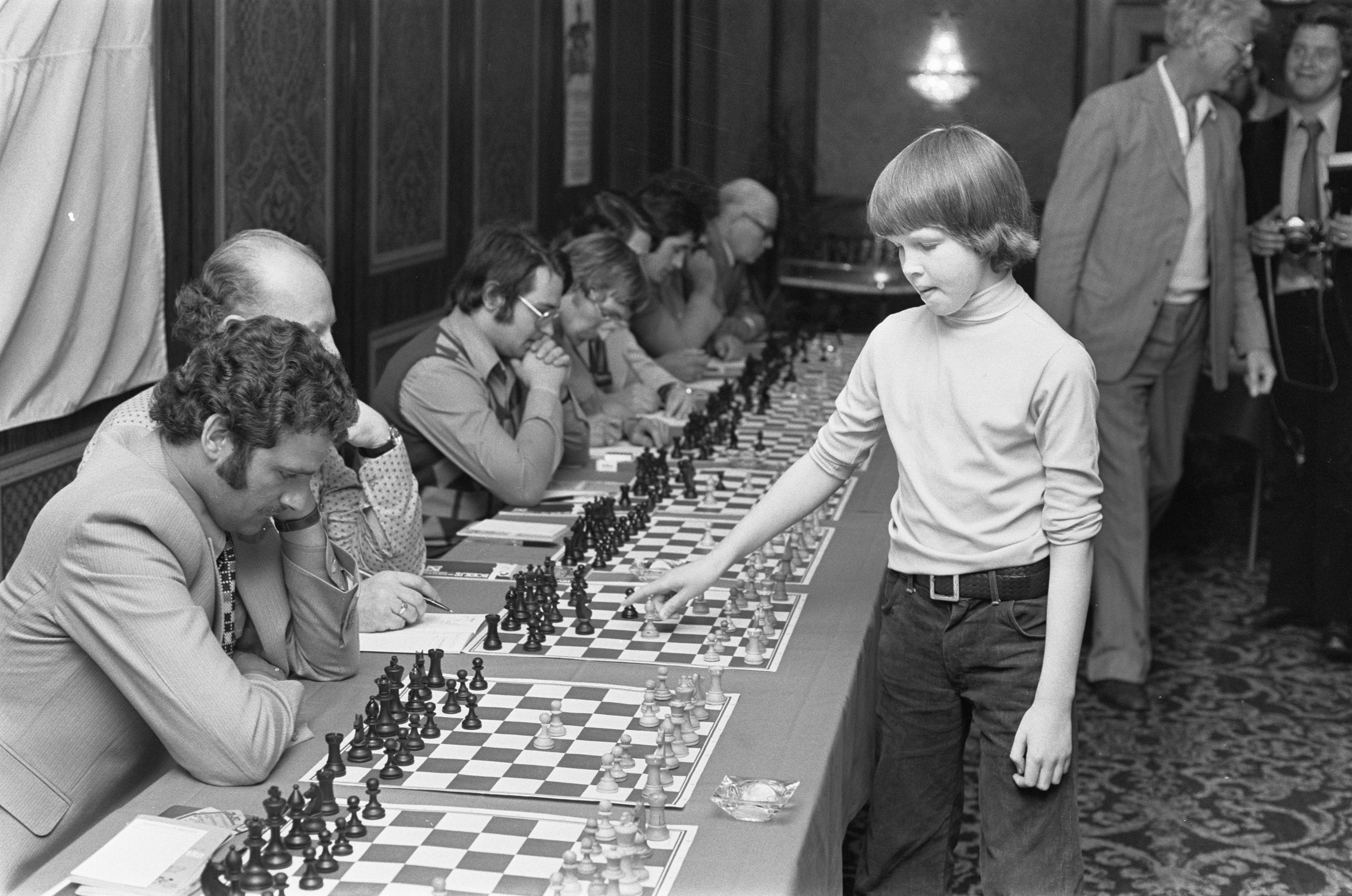 Tien-jarig schaakwonder Nigel Short uit Engeland speelt simultaan "vluggertje" tegen grootmoeder Olafsson, 1976.